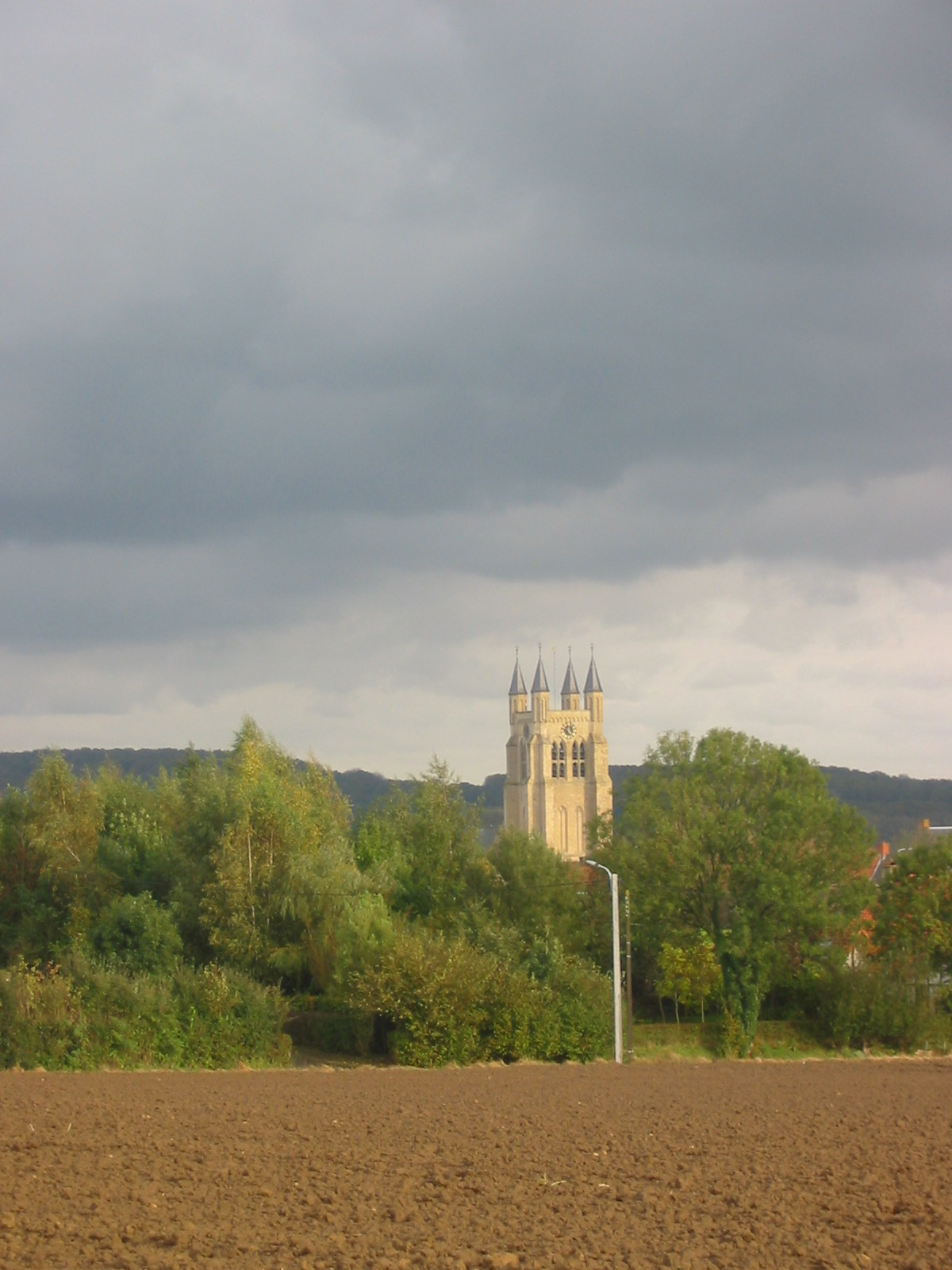 Loker, Heuvelland, Flanders